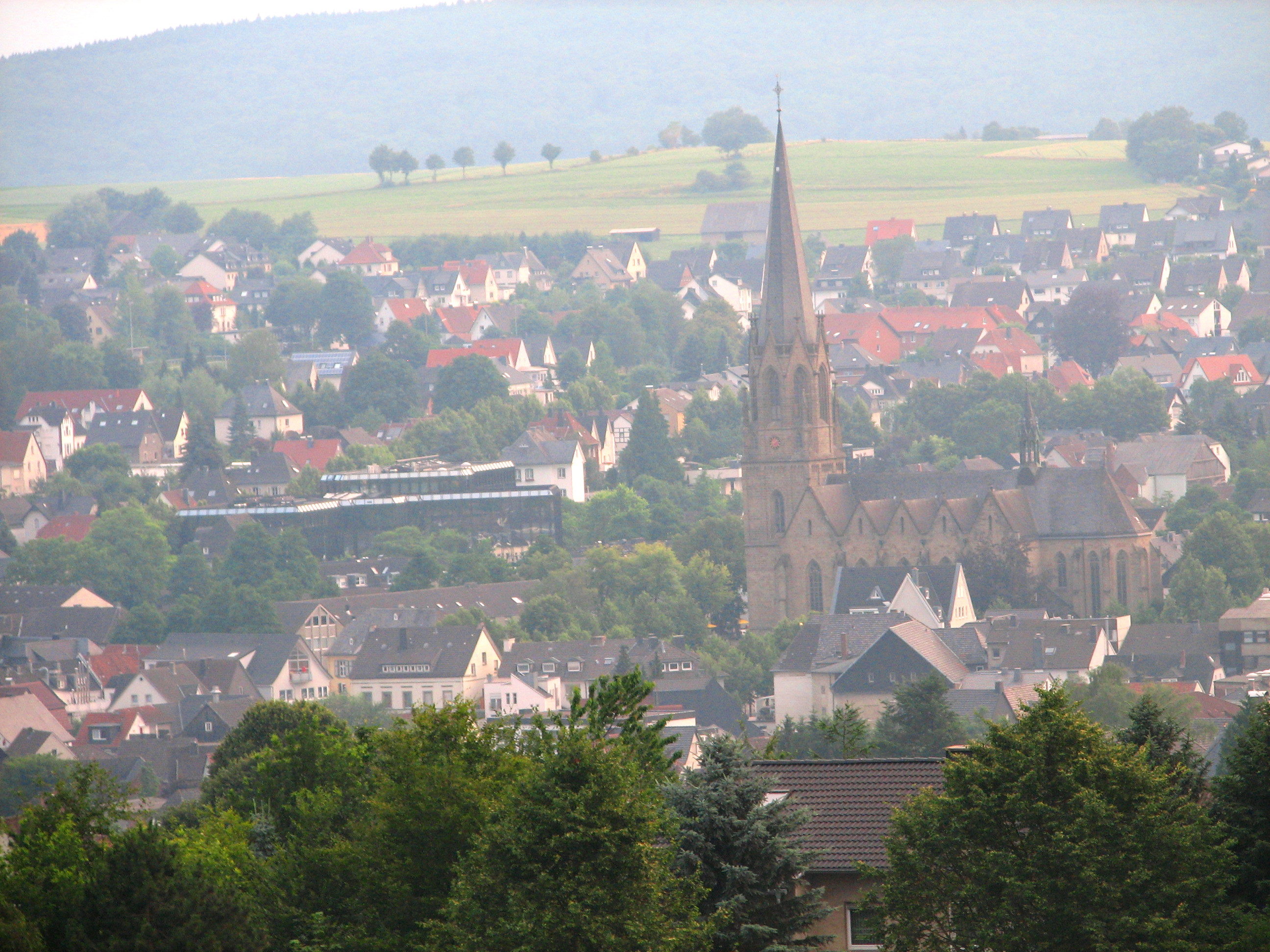 Blick über Warstein mit Kirche View of Warstein with church